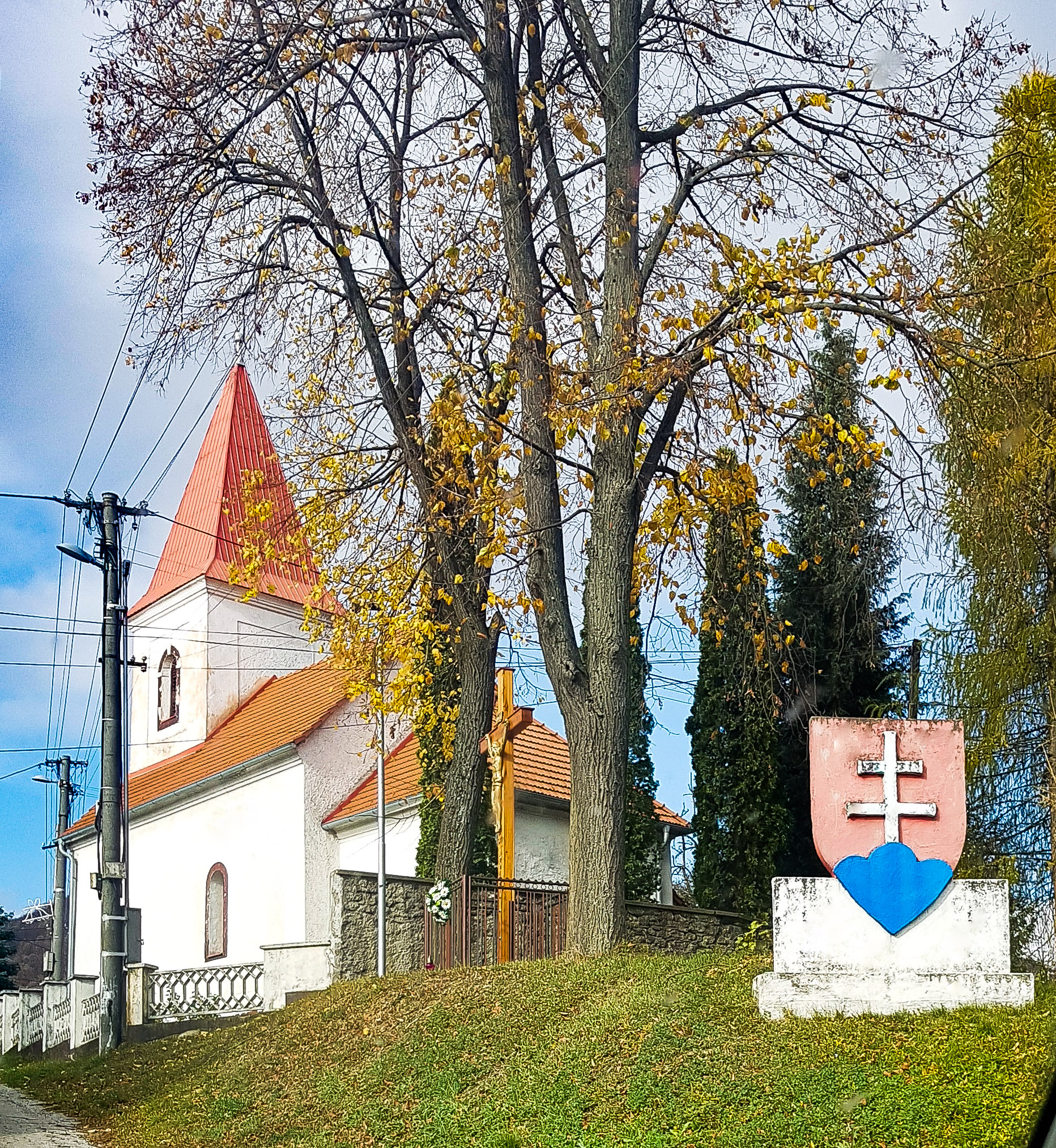 Die Kirche im slovakischen Dorf Petrova Lehota.